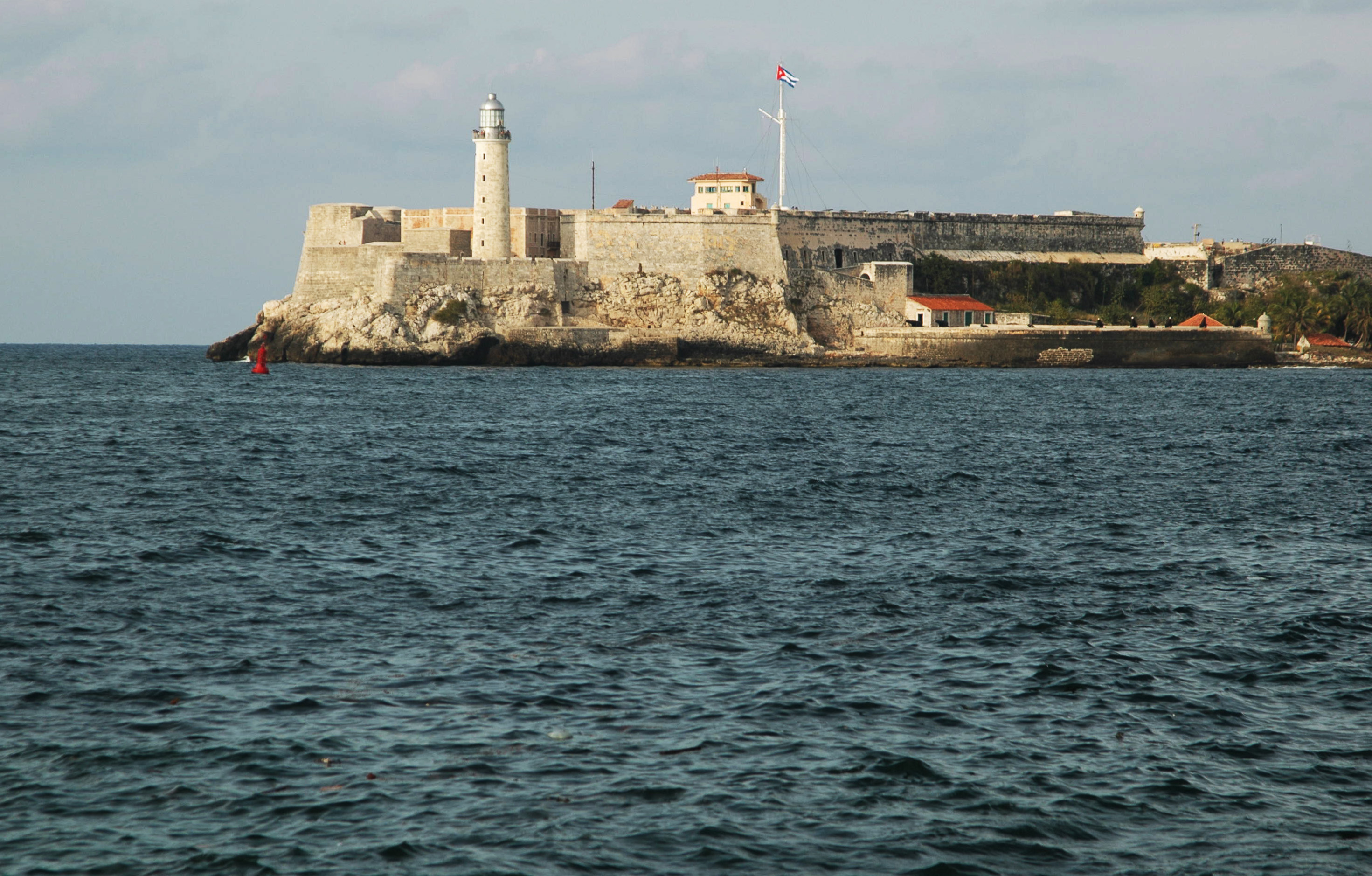 Cuba, L'Avana, Castillo de los Tres Santos Reyes Magnos del Morro